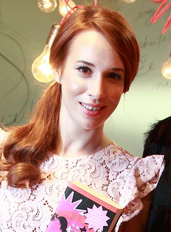 Táňa Pauhofová